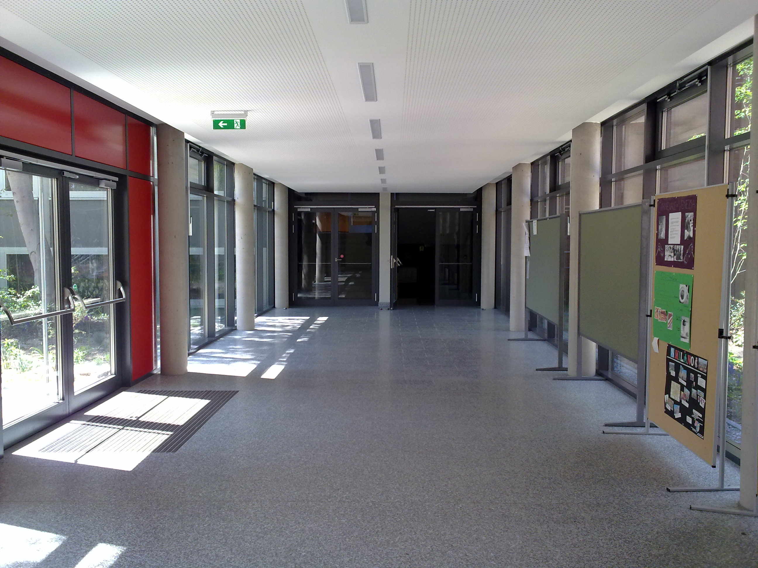 Glasgang von innen OHG Mak